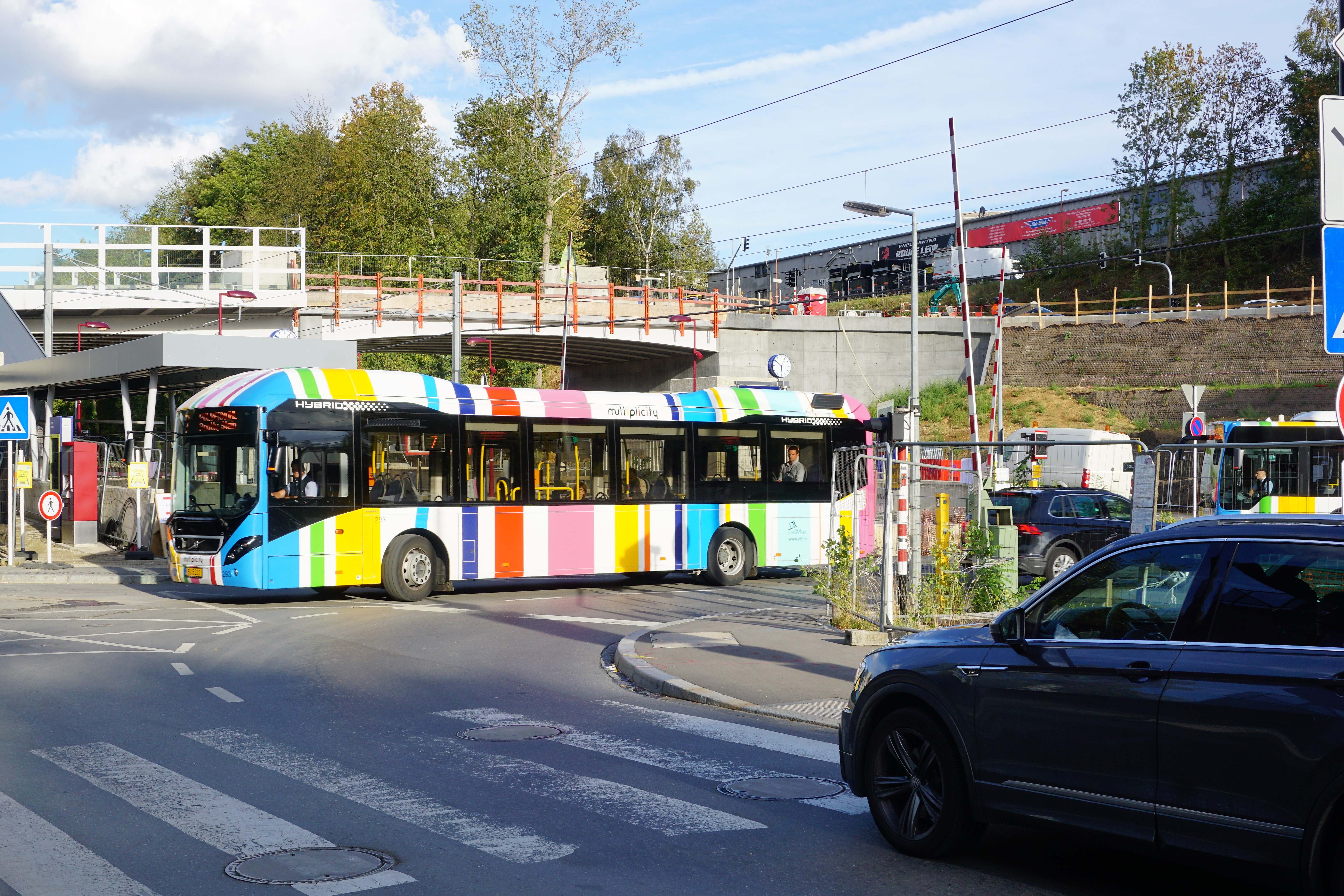 Luxembourg-Cents, passage à niveau (PN 56), rue des Pommiers en direction du val de Hamm. Vue prise quelques jours avant la suppression définitive du passage à niveau.